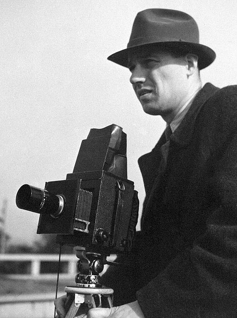 Ferdinand Bučina, portrét